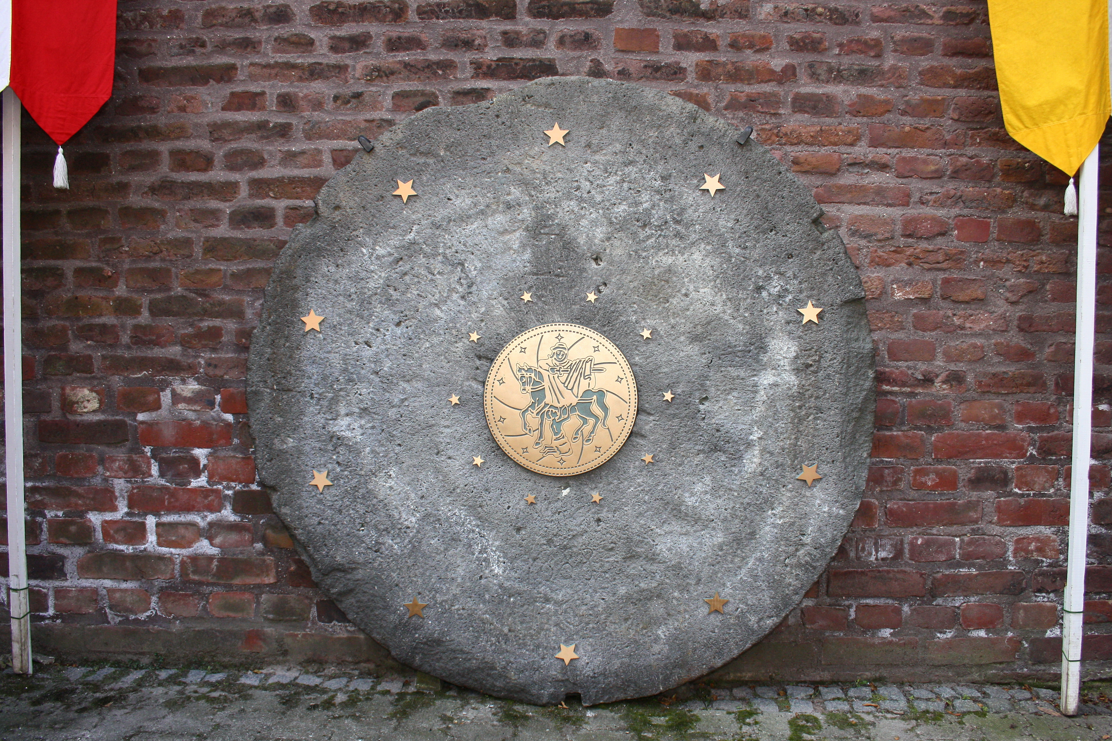 Symbol für das Siegel der Pfarrei St. Martin in Wegberg